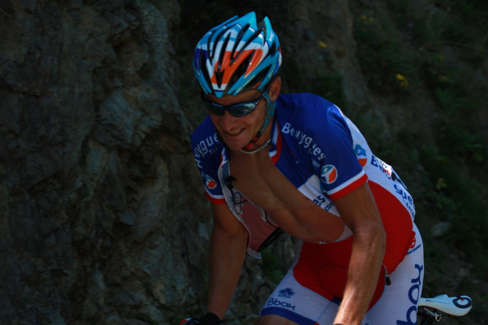 5653 voeckler